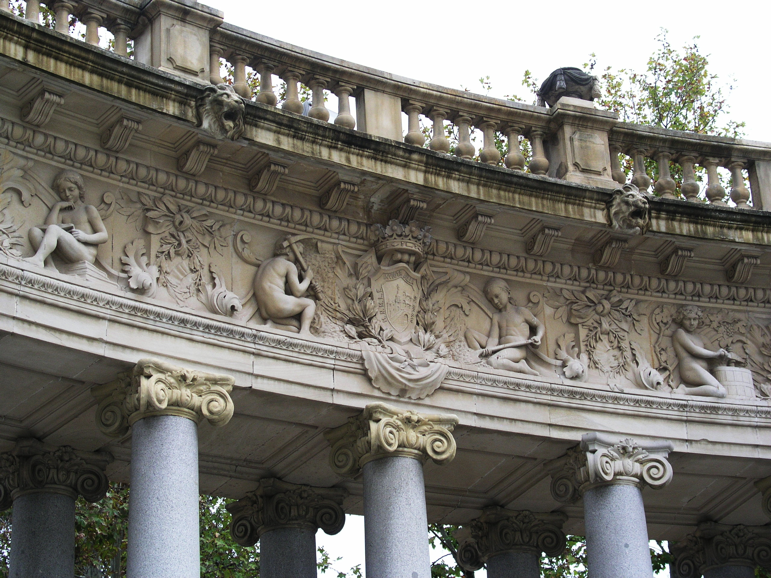 Jardines del Buen Retiro, Madrid, Spain. Monument to Alfonso XII.